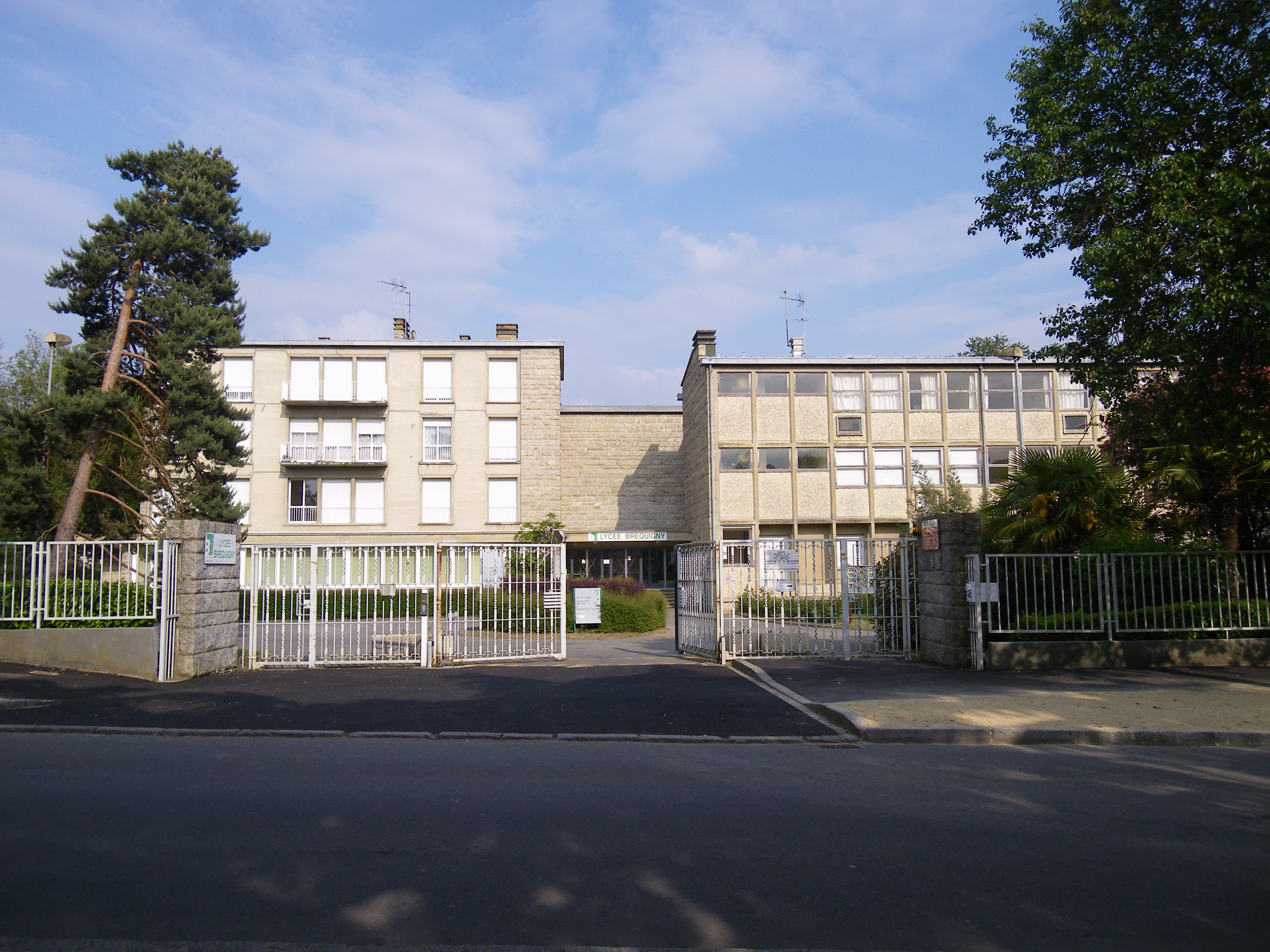 l'entrée du lycée brequigny a rennes